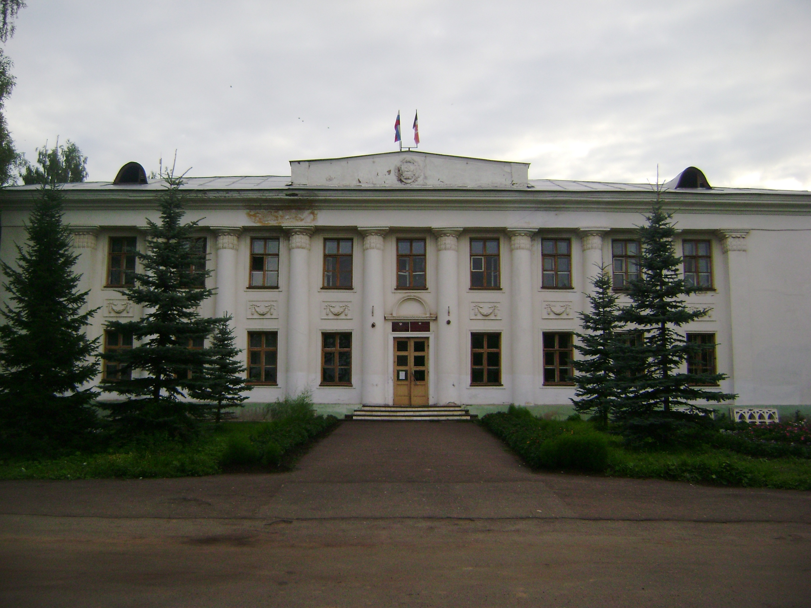 Здание ярской районной администрации